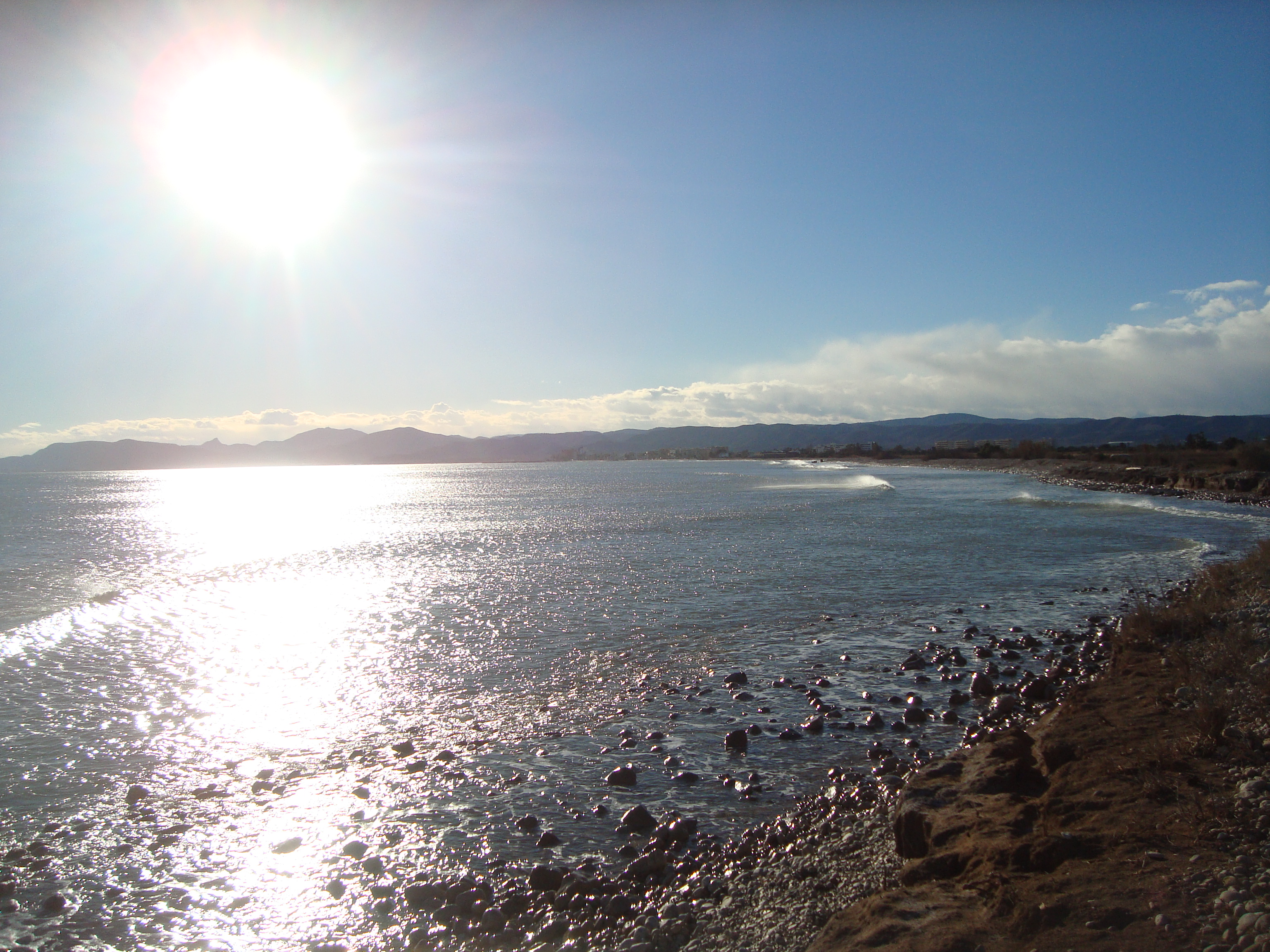 Platja del Campás